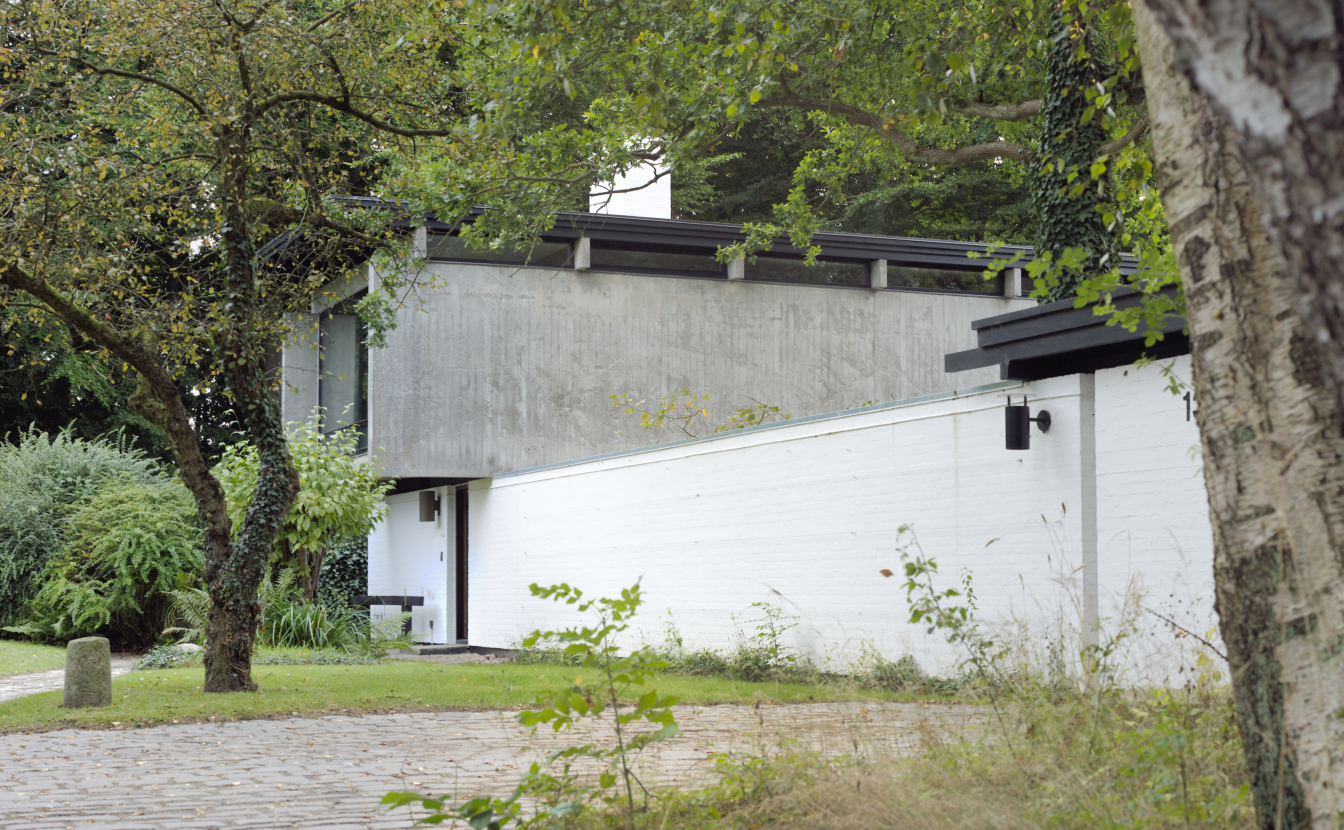 Højen 13, Brabrand